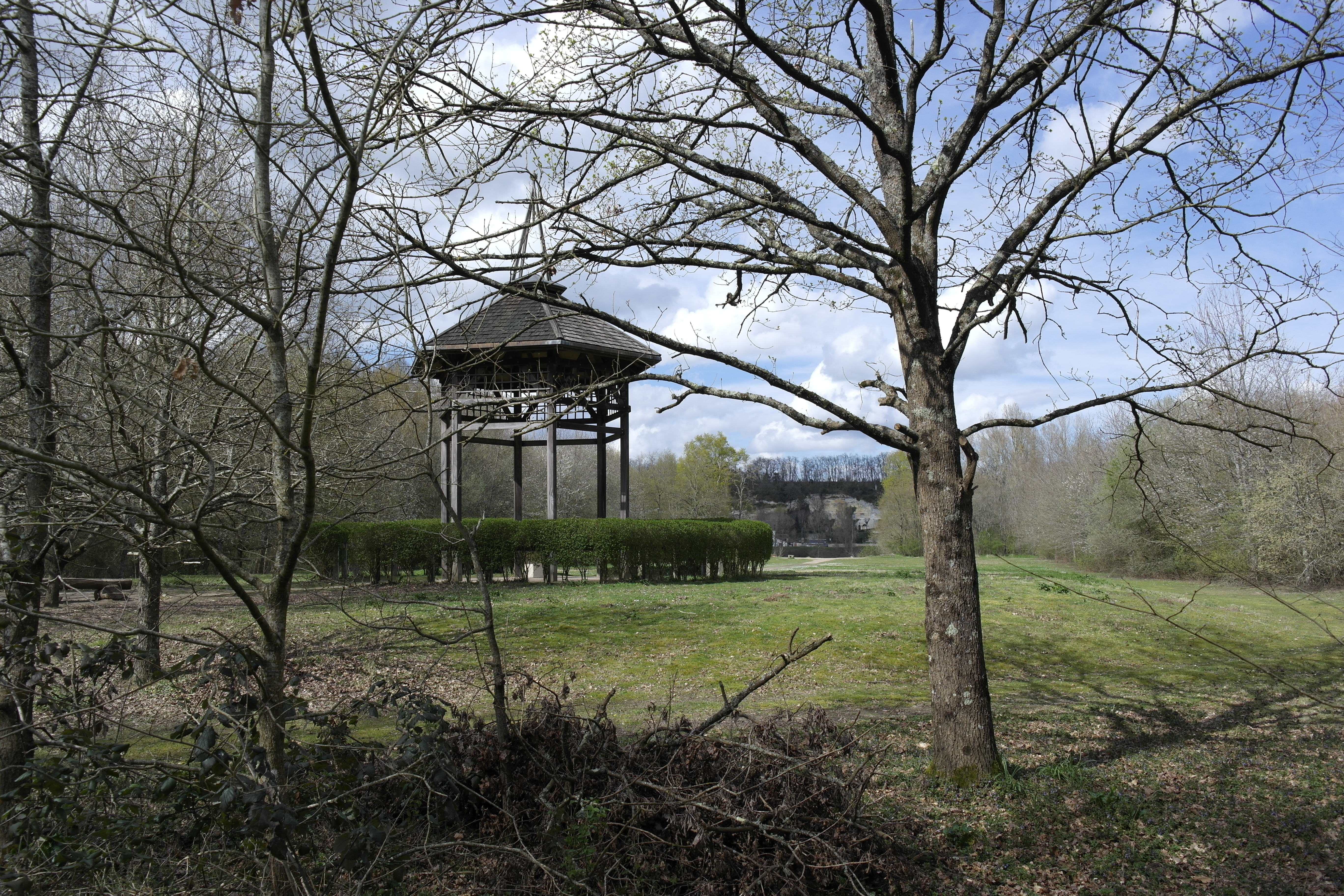 Quiosque de l'île de la Métairie, à La Ville-aux-Dames.